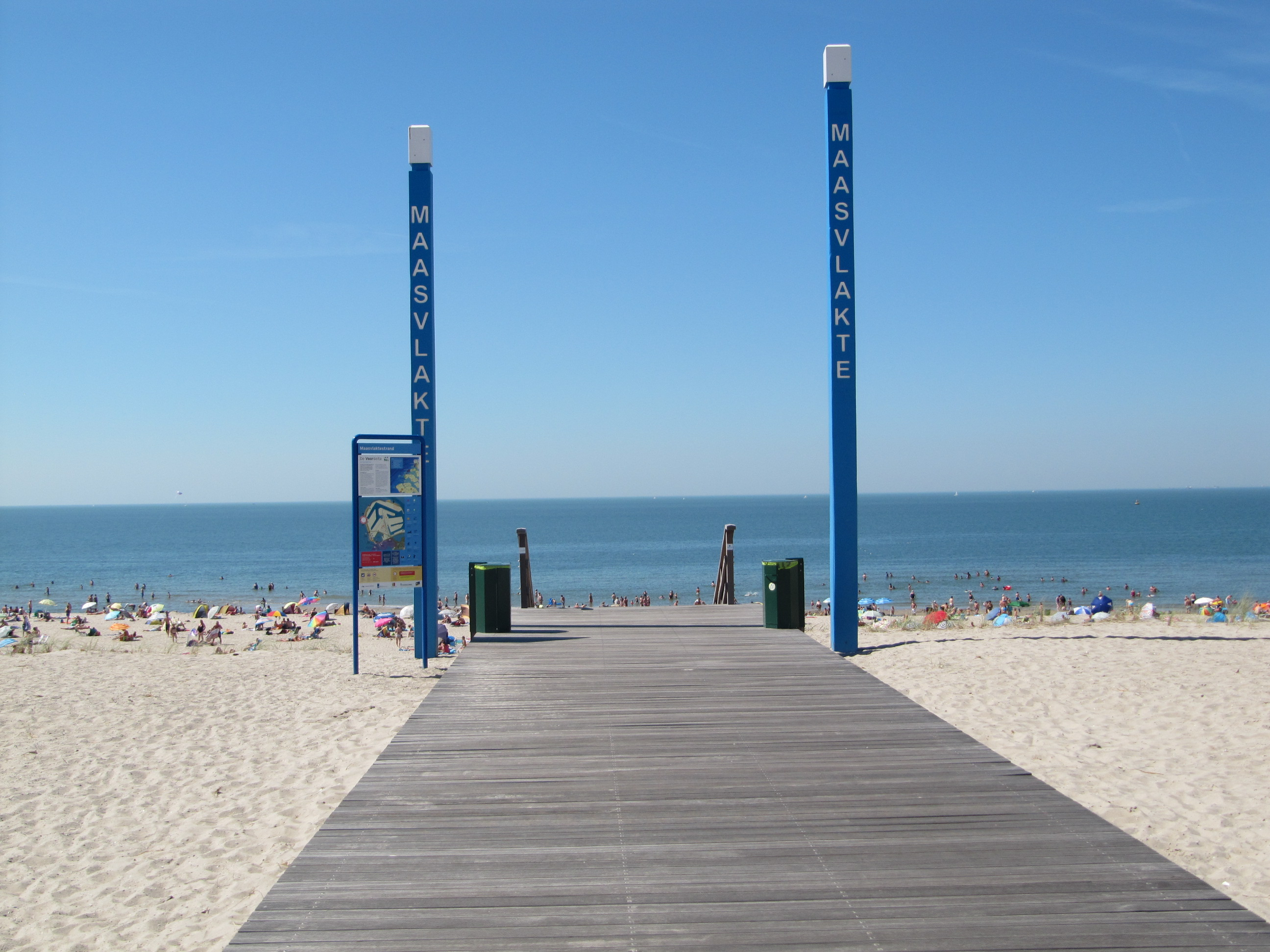 Nieuwe strandopgang 2e Maasvlakte, slufterstrand